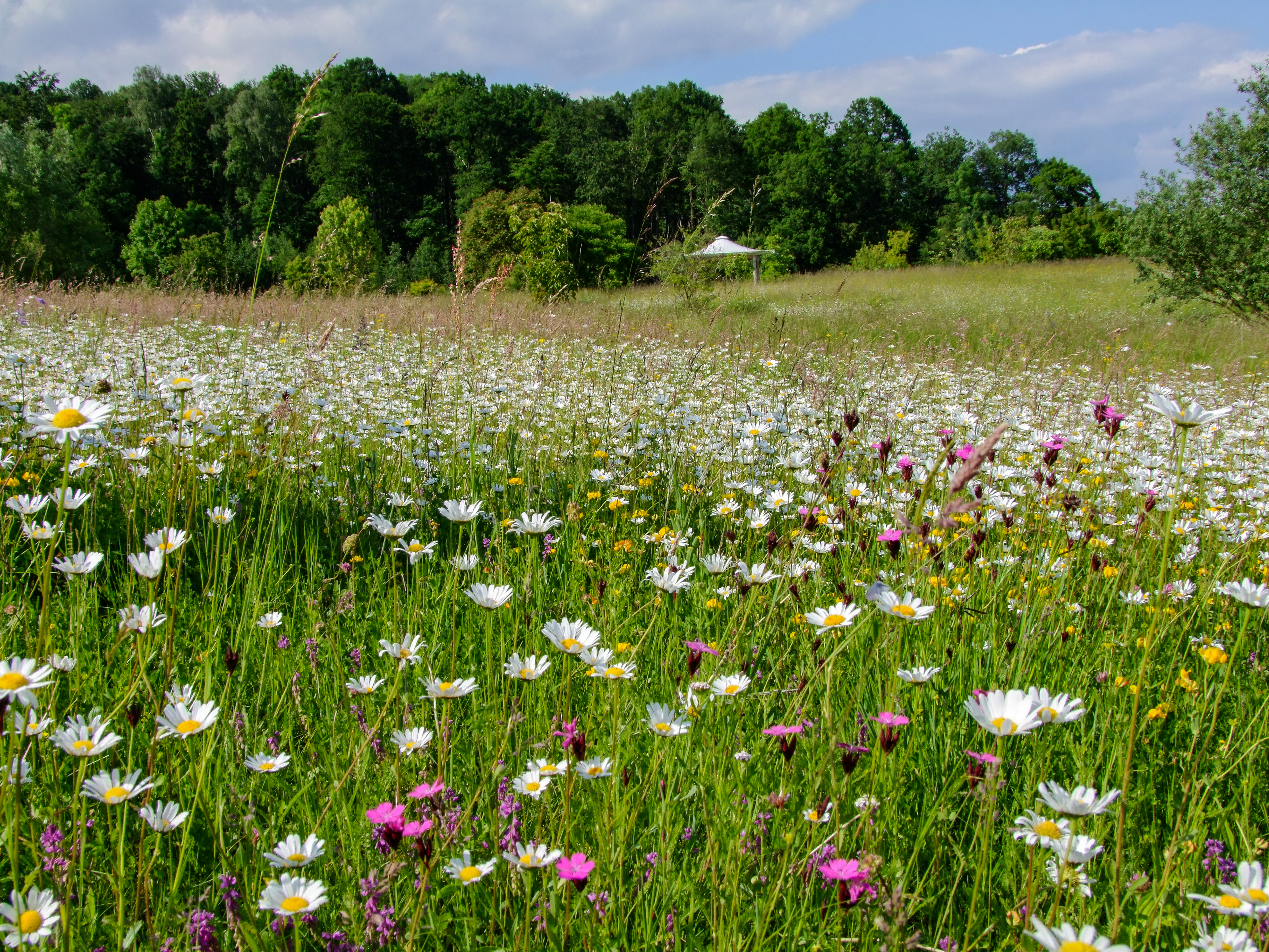 Blumenwiese im Botanischen Garten der Universität Ulm